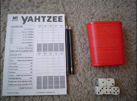 Benodigdheden voor het spelen van Yahtzee